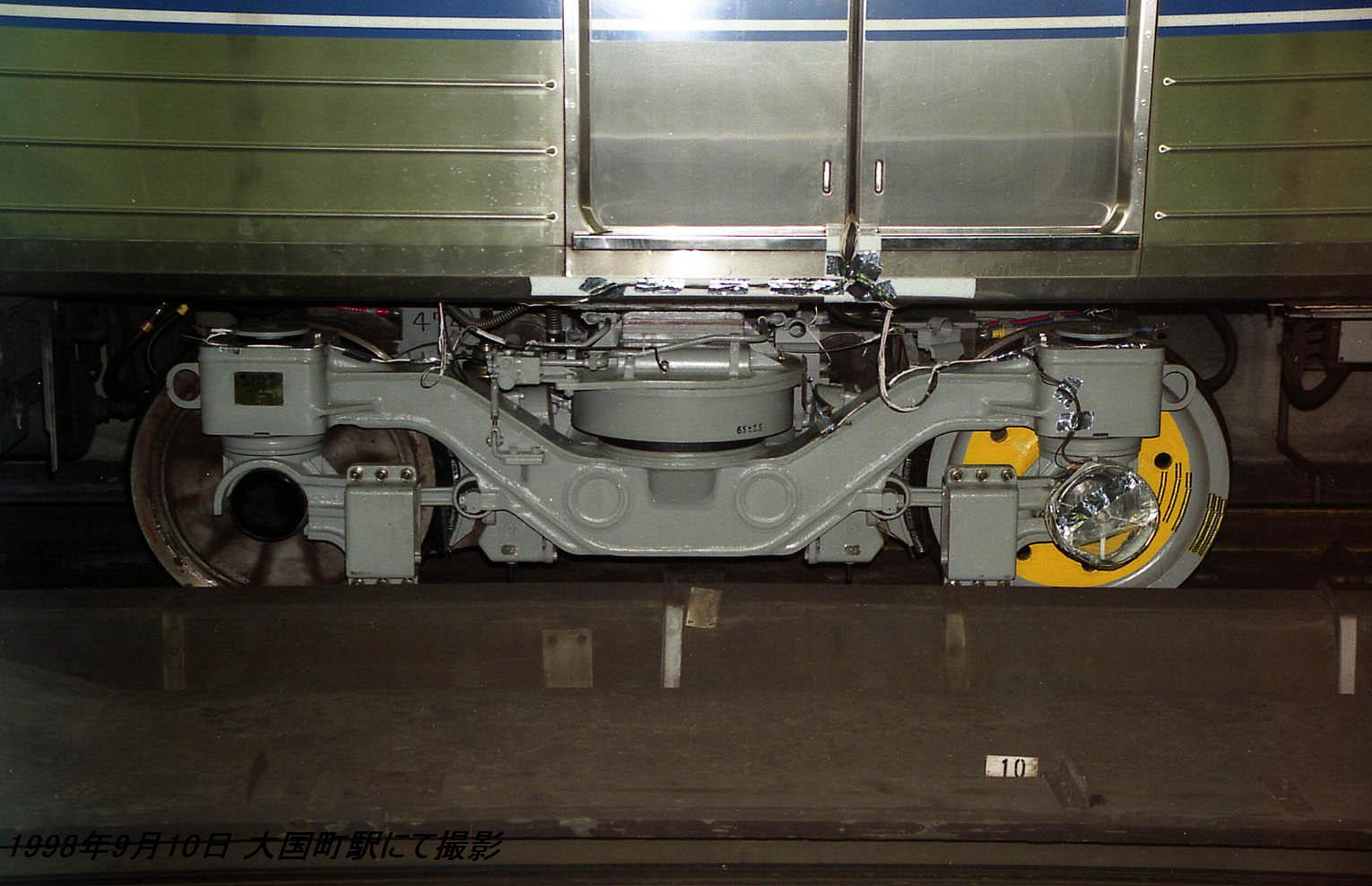 大阪市交通局 御堂筋線・四つ橋線 大国町駅にて撮影